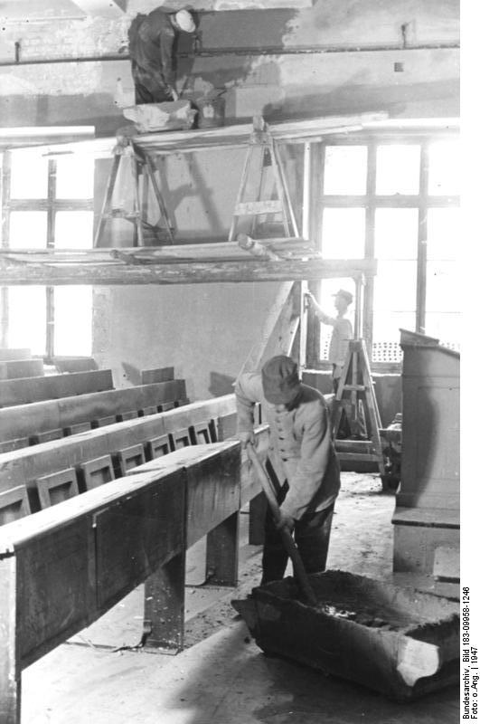 Zentralbild Wiederaufbau der Hörsäle der Berliner Humboldtuniversität nach dem II. Weltkrieg. 9 958/1246